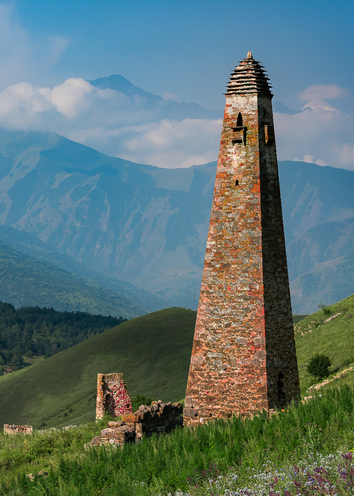 Башня в древнем ингушском городе Ний (Джейрахский район, Ингушетия)